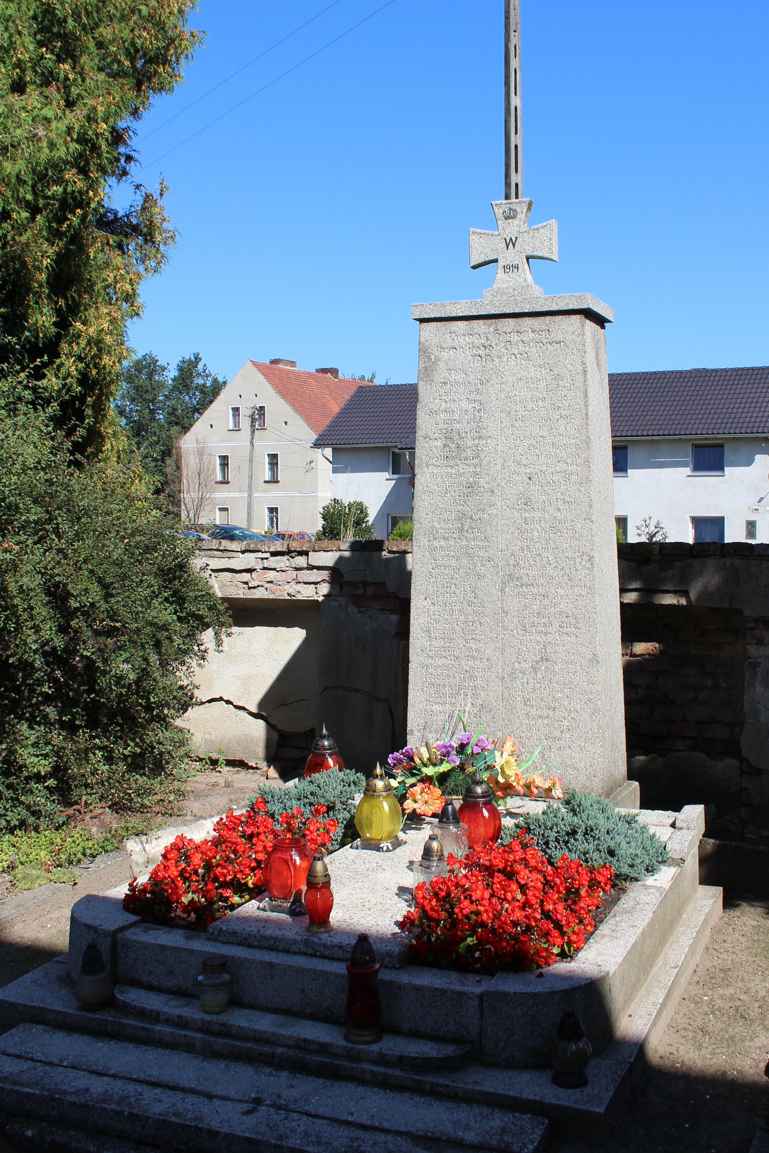 Przechód - wieś w Polsce w województwie opolskim, w powiecie nyskim w gminie Korfantów.